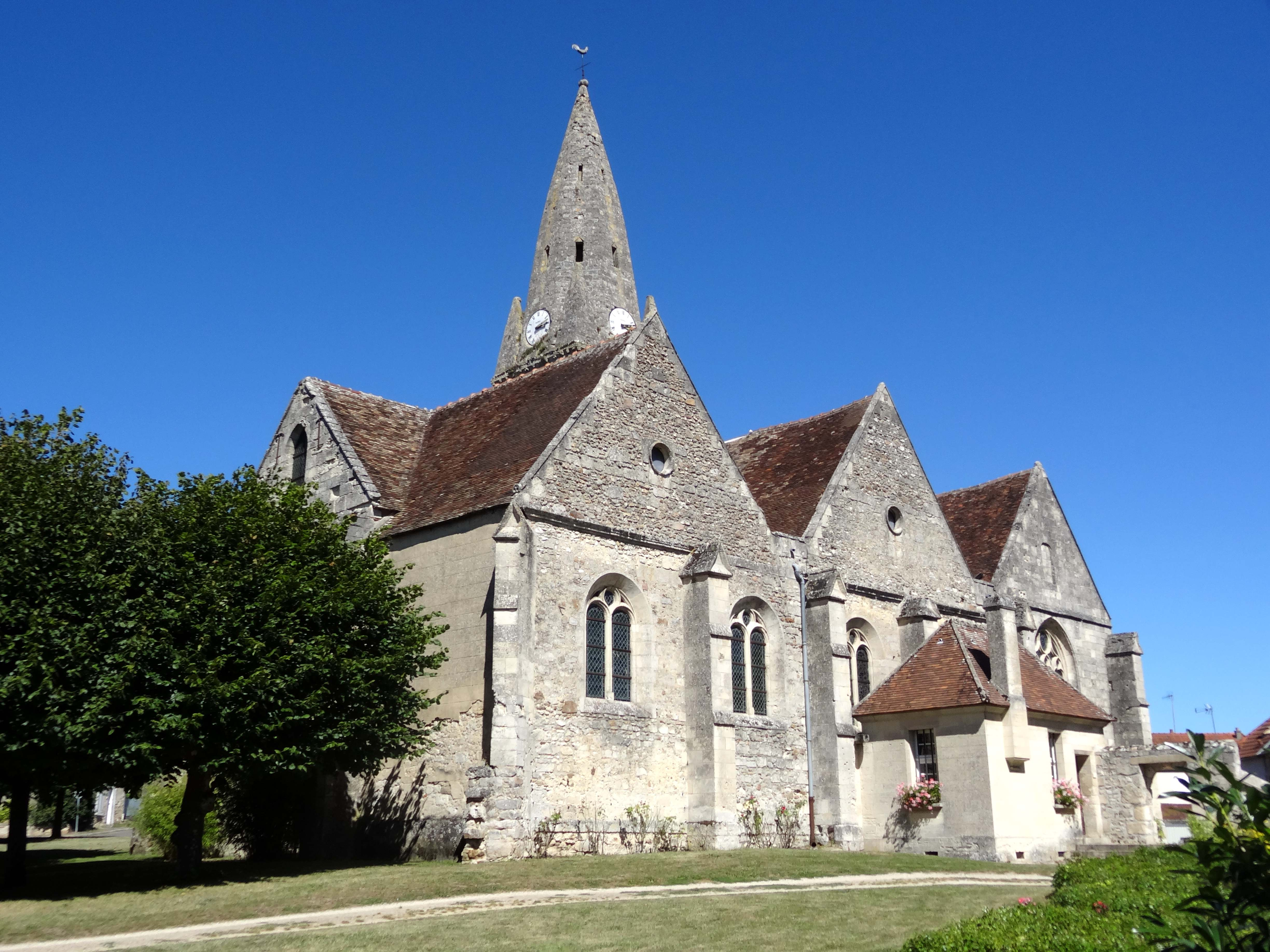 Église Sainte-Geneviève de Marolles - voir titre.